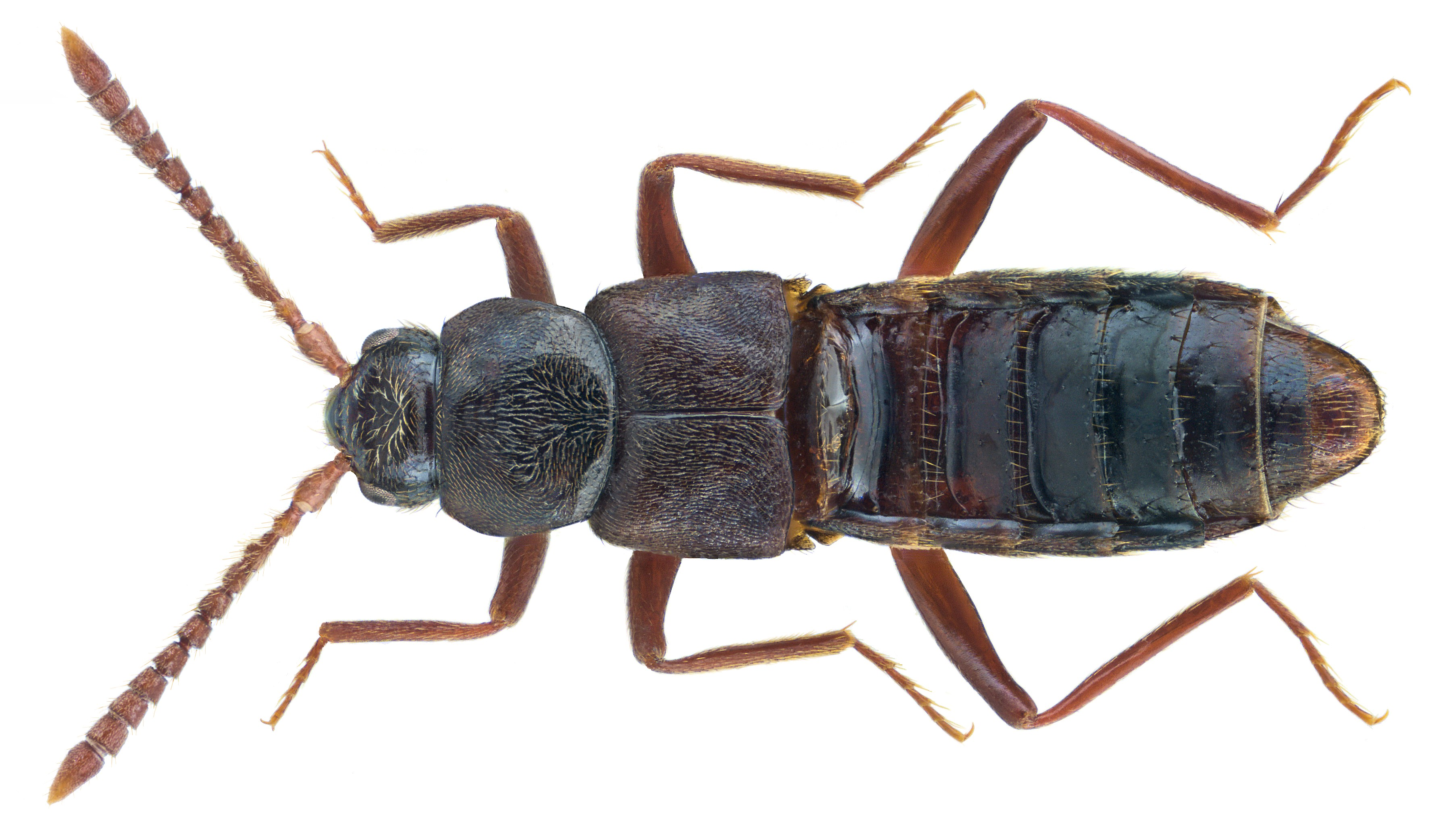 Familie: Staphylinidae Grösse: 6-8 mm Verbreitung: Europa Ökologie: bei Ameisen Fundort: Germania, Bayern, Oberfranken, Kulmbach leg.det. U.Schmidt, 1984 Foto: U.Schmidt, 2006